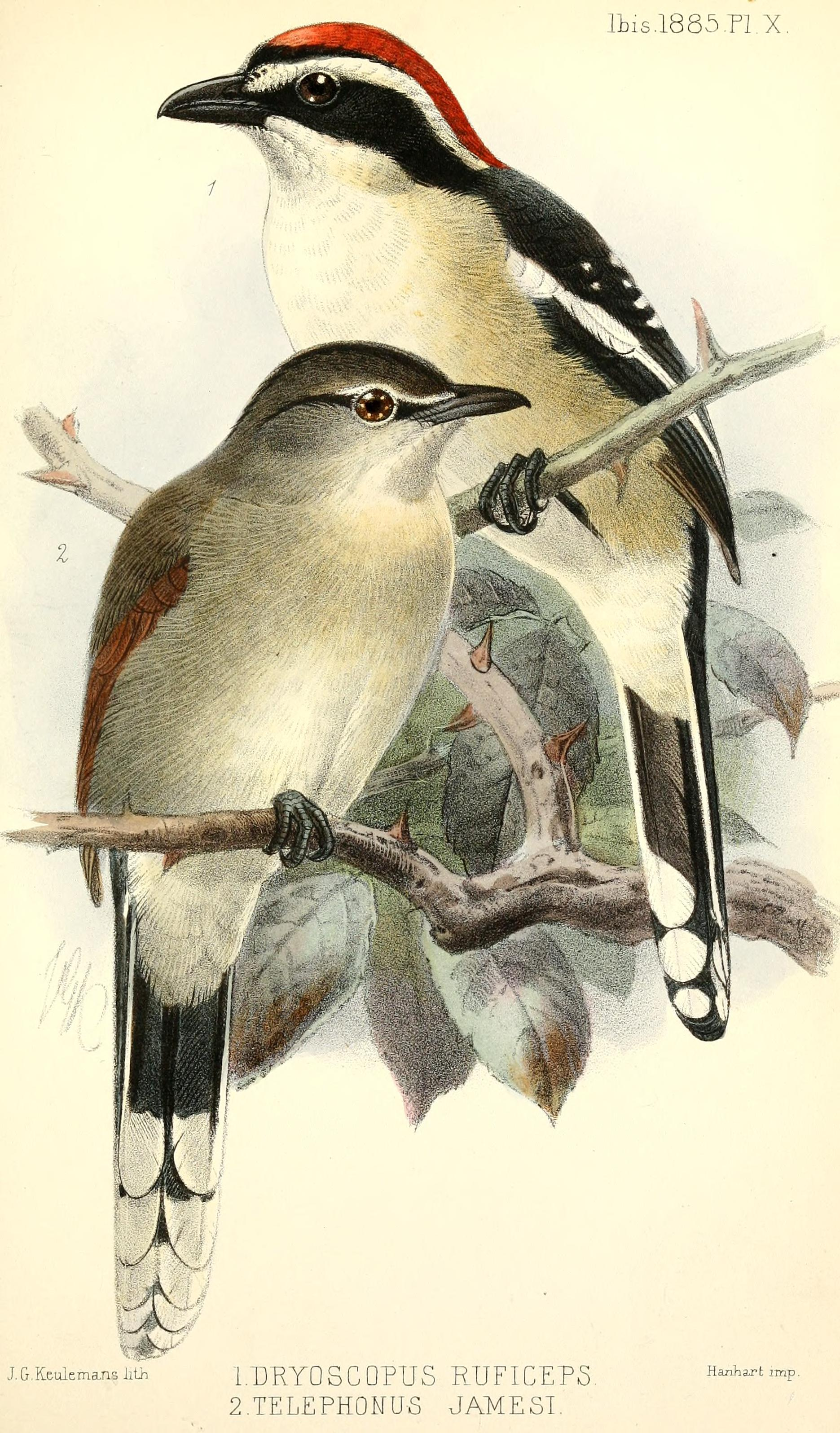 Laniarius ruficeps, Tchagra jamesi 1. Dryoscopus ruficeps = Laniarius ruficeps 2. Telephonus jamesi = Tchagra jamesi